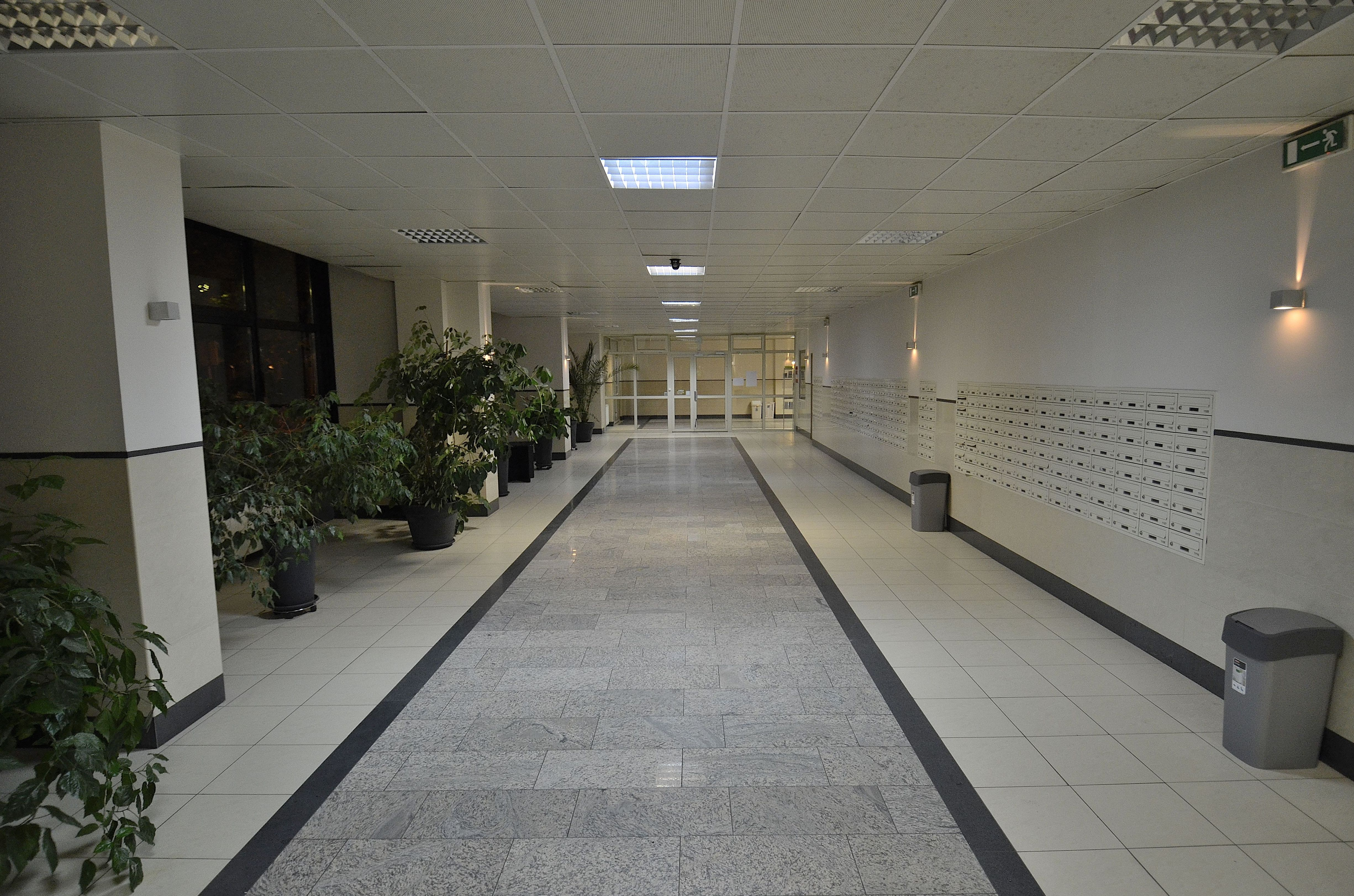 Hol bloku Osiedla Za Żelazną Bramą przy ul. Granicznej 4 w Warszawie